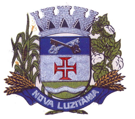 Brasão do município brasileiro de Nova Luzitânia.